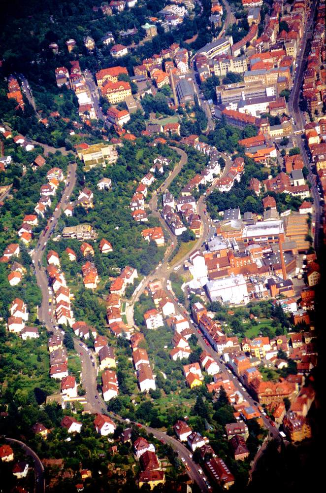 Photoflug über Heslach mit Schickhardt- /Mörike-Gymnasium, Hauff-Schule, Stadtbad Heslach und Karlshöhe, sowie unser Elternhaus in der Hohentwielstrasse 57 D in HHL - Gert D. Geissler